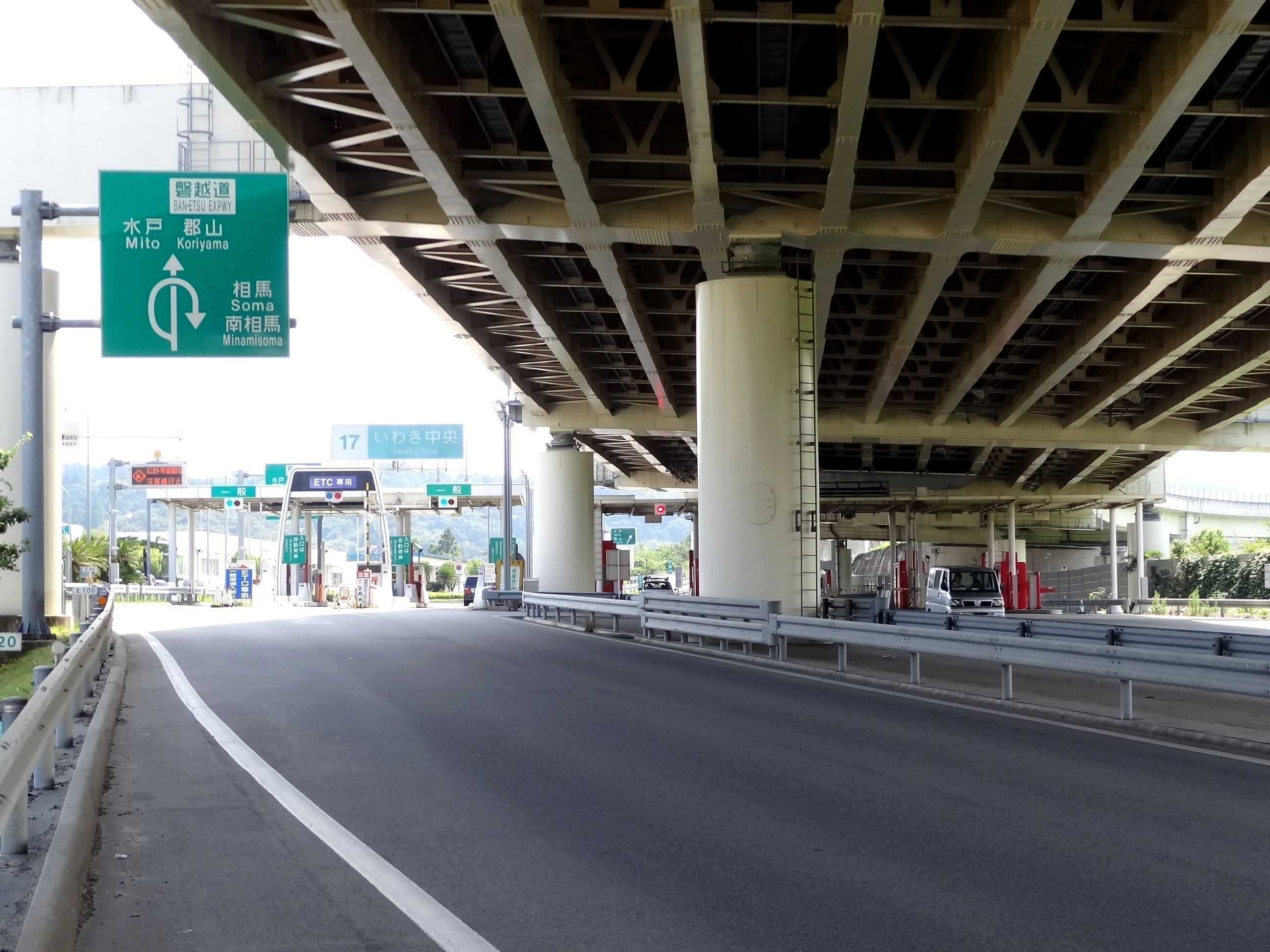 常磐自動車道 いわき中央インターチェンジ（料金所付近）